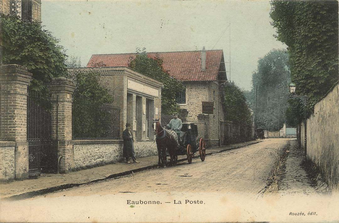 Eaubonne (France) - La Poste vers 1900